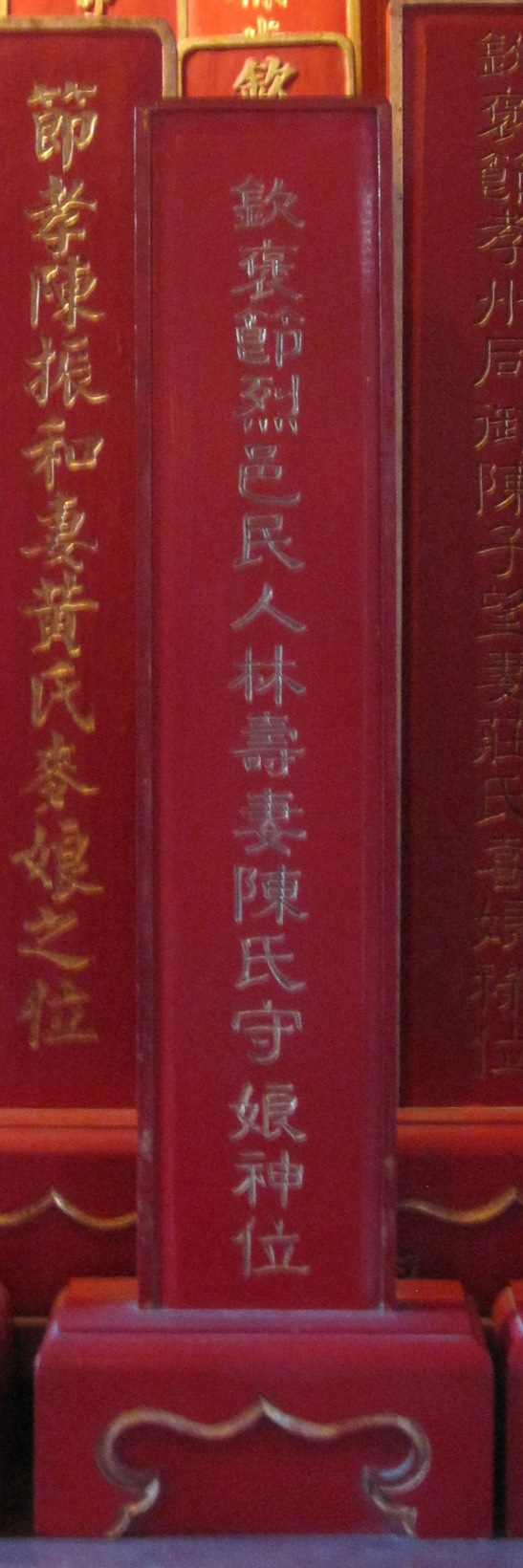 臺南孔廟陳守娘牌位